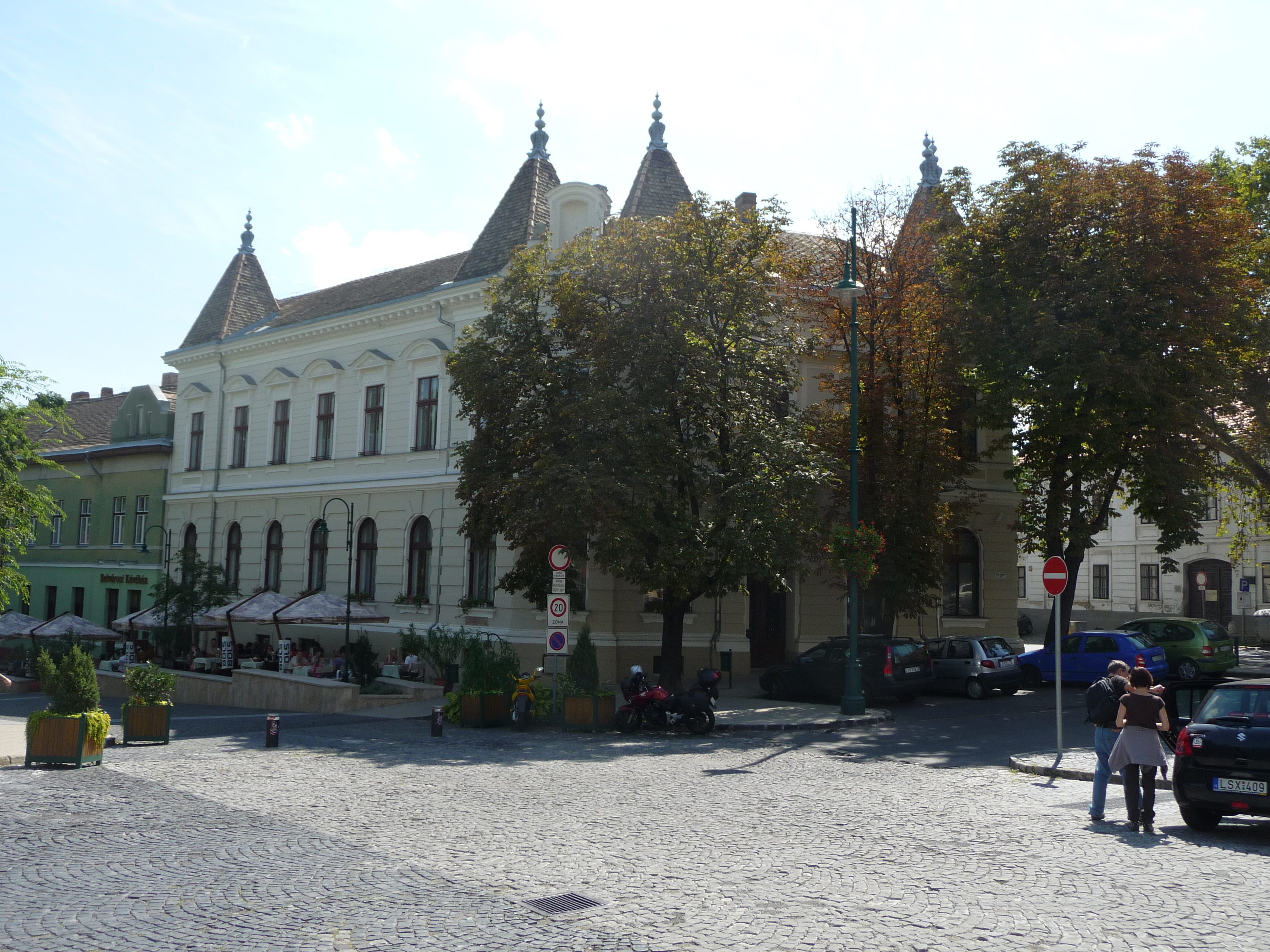 Az egykori Népbank. - Szekszárd, Garay tér 18